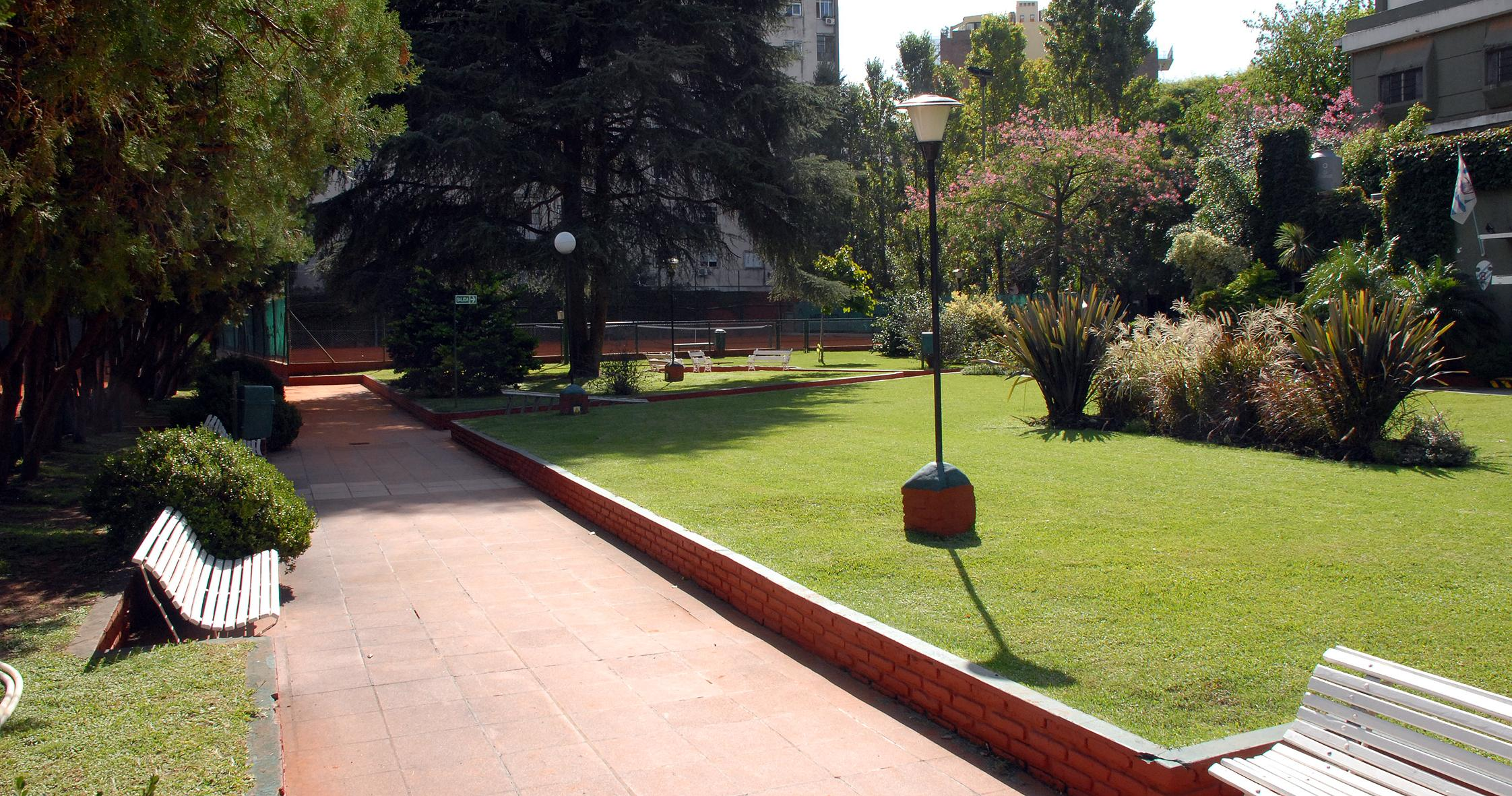 Tenis 1